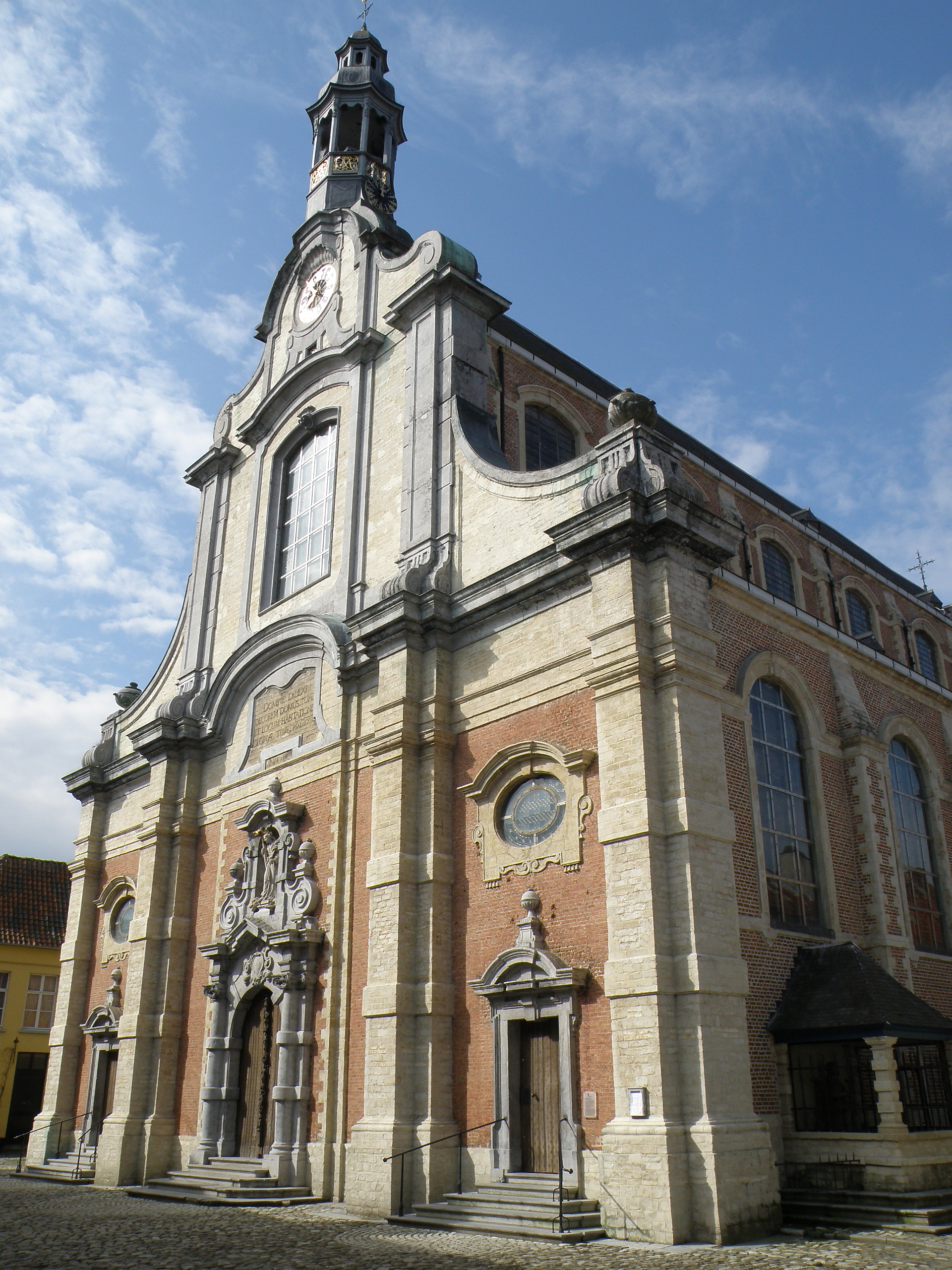 Lierre (en néerl. Lier), ville de Flandre (Belgique), située à une quinzaine de km. au sud-est d’Anvers. Église du béguinage, placée sous le vocable de Sainte-Marguerite (néerl. Sint-Margarethakerk), de style baroque, construite entre 1664 et 1665, d’après les plans des arch. L. Kest en J. De Winter ; clocher d'Engelbert Baets. Façade orientale (le chœur est tourné vers l’ouest).